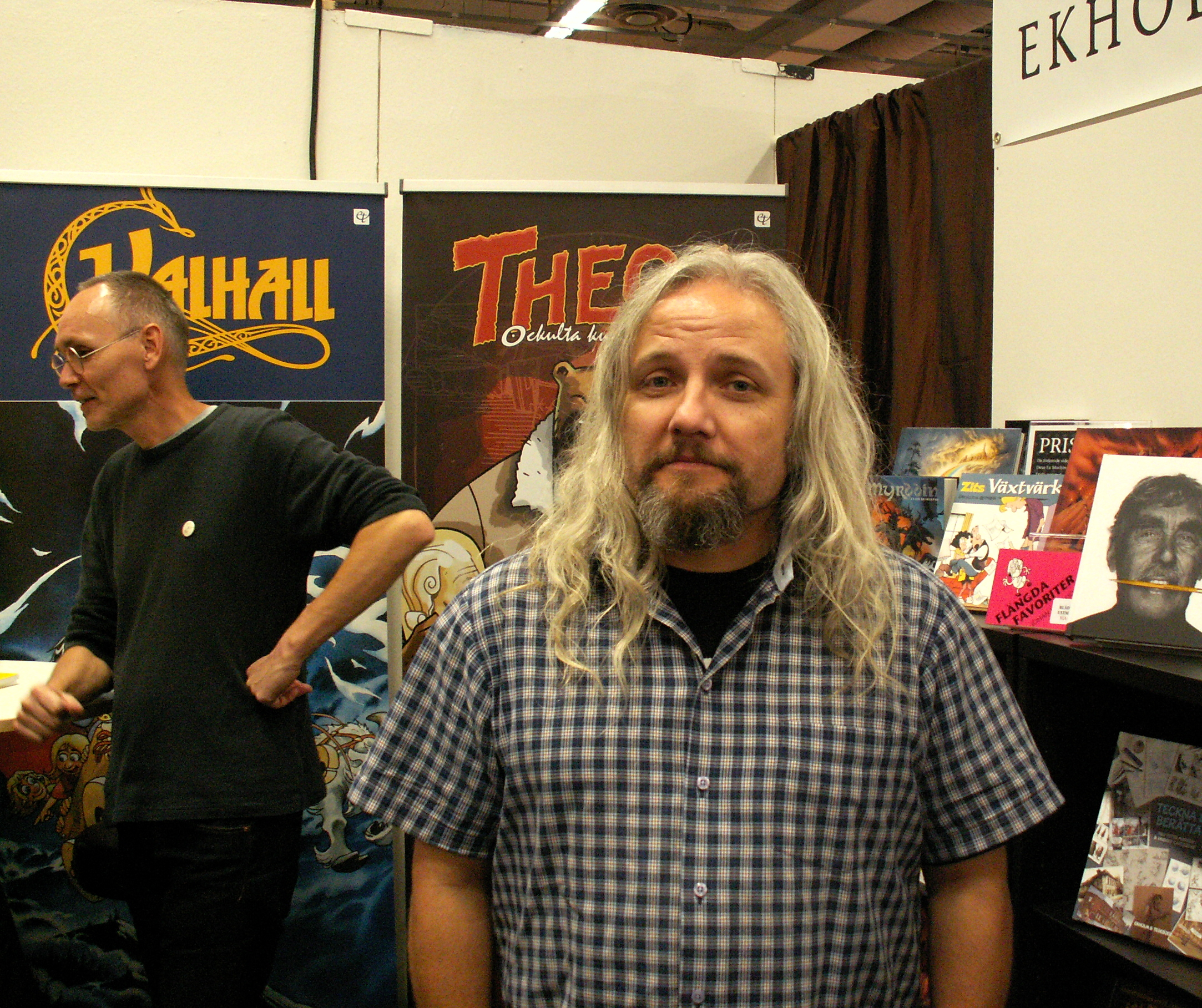 Mikael Tegebjer, i montern för sitt förlag Ekholm & Tegebjer, på Bokmässan 2013. Till vänster i bild skymtar Nicolas Križan, mångårig medarbetare i Tegebjers olika förlagsverksamheter.